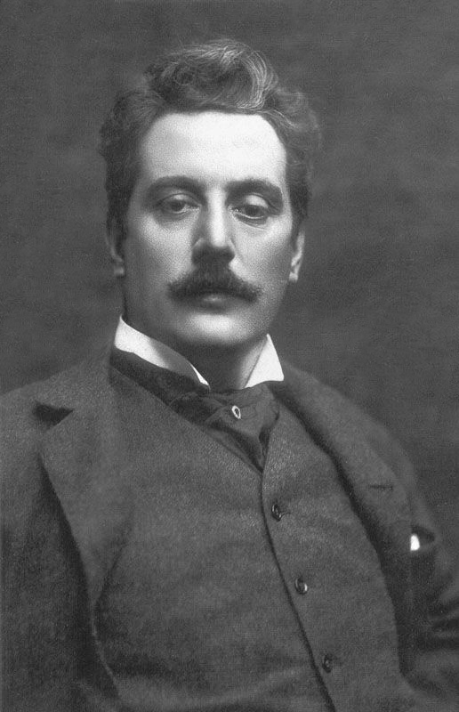 Composer Giacomo Puccini in a studio photograph.